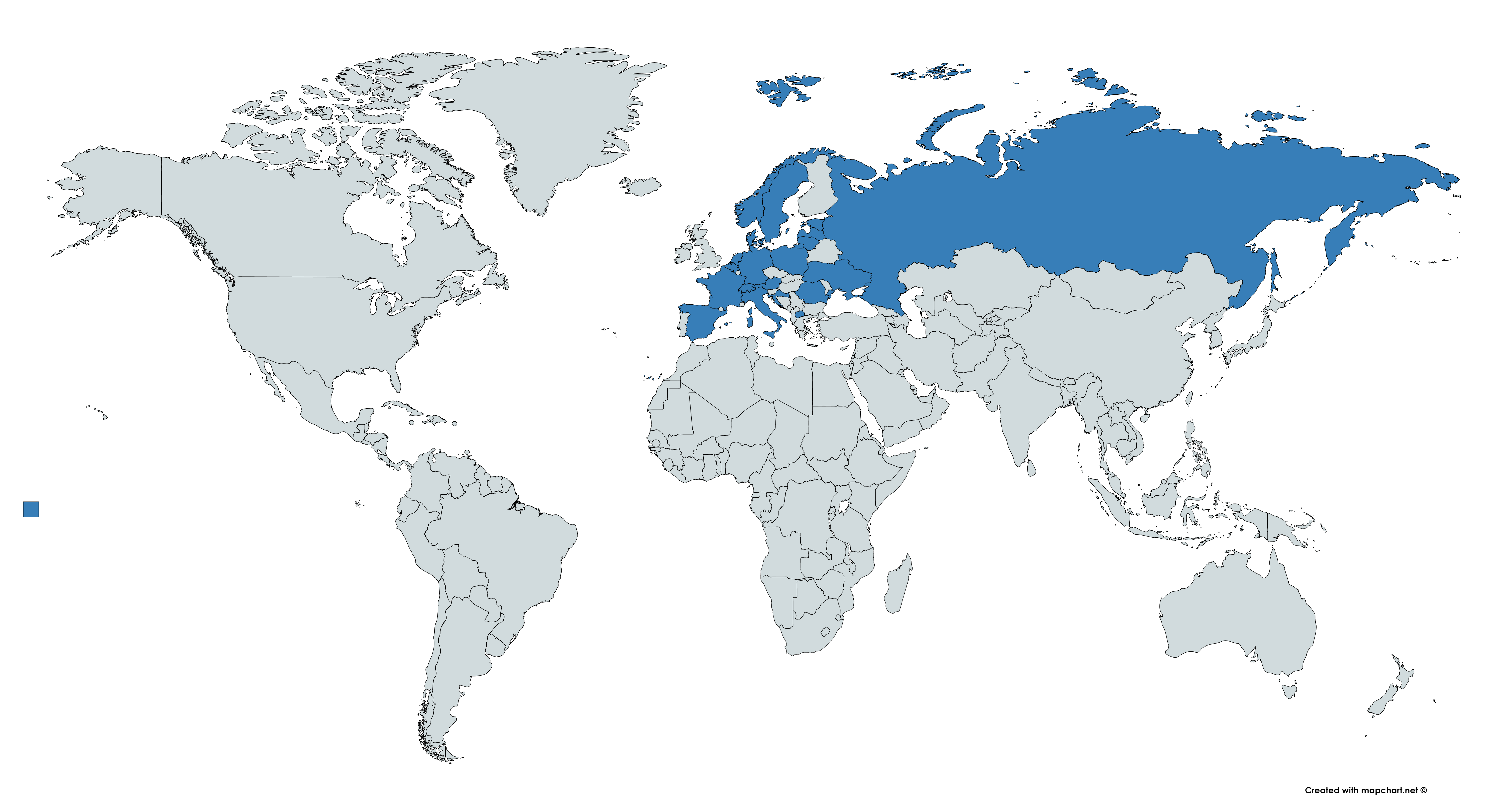 Nordica kaart1